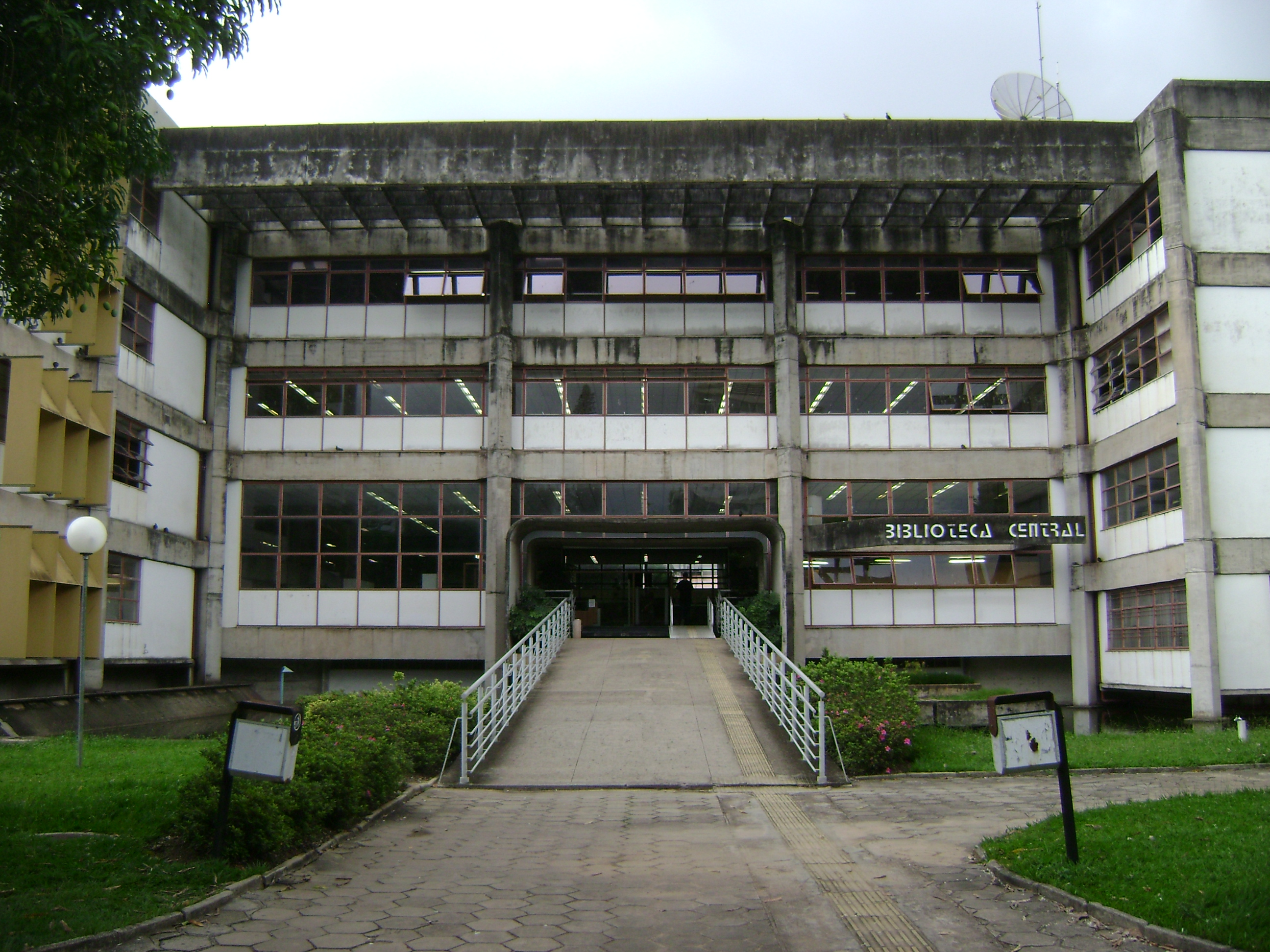 Entrada da Biblioteca Central da UFMG